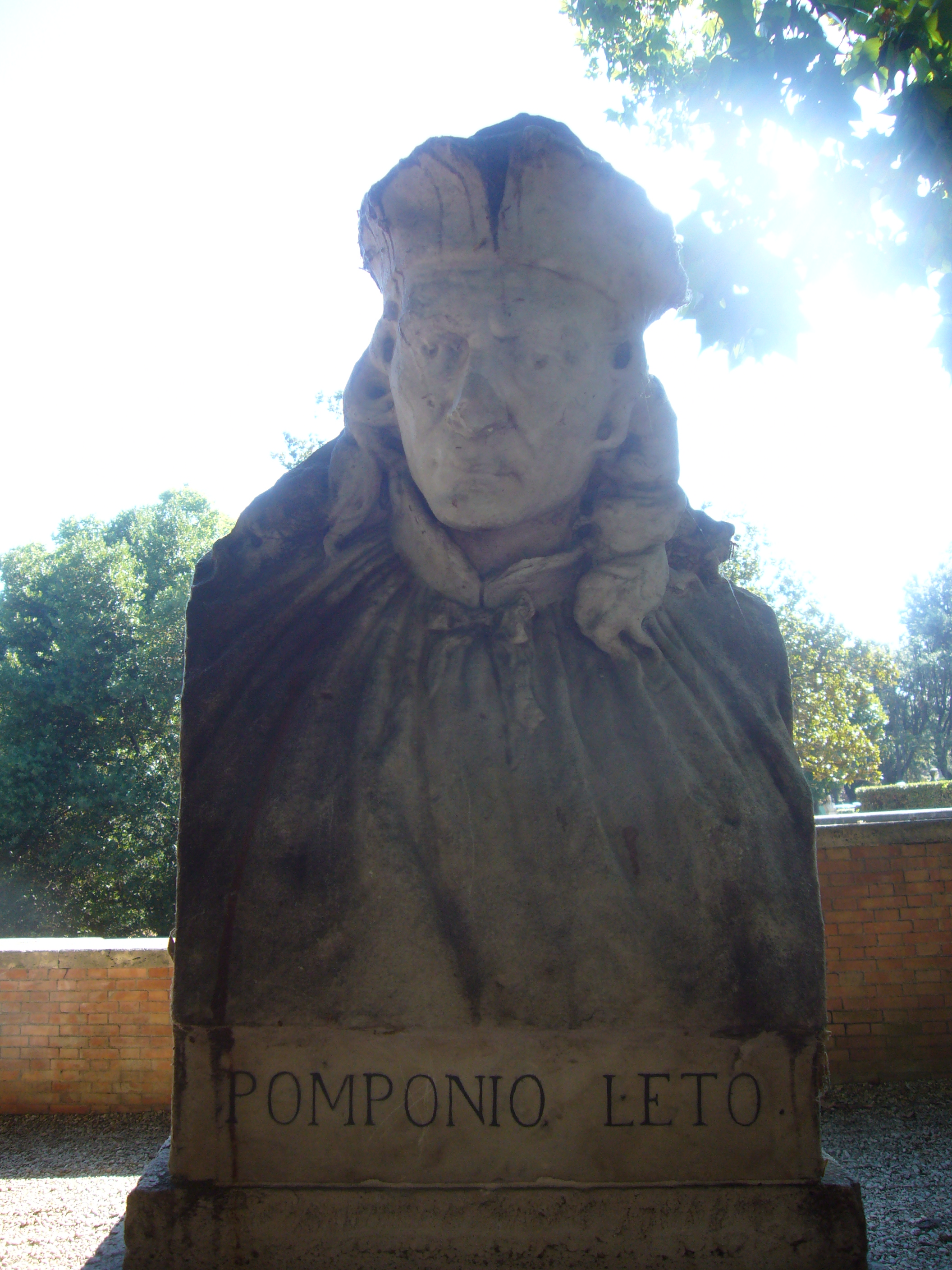 Roma, Pincio. Busto di Pomponio Leto